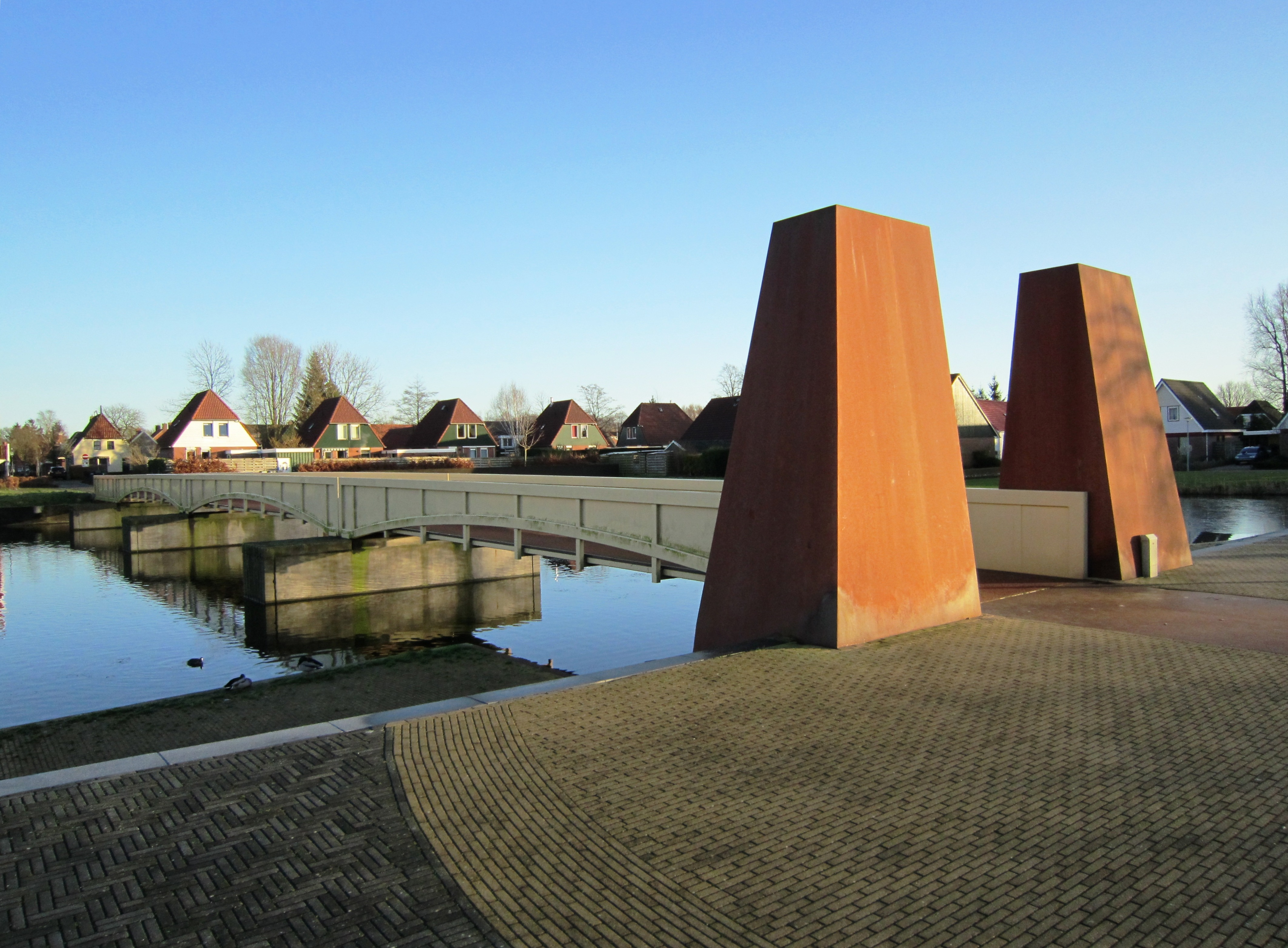 Bad Nieuweschans